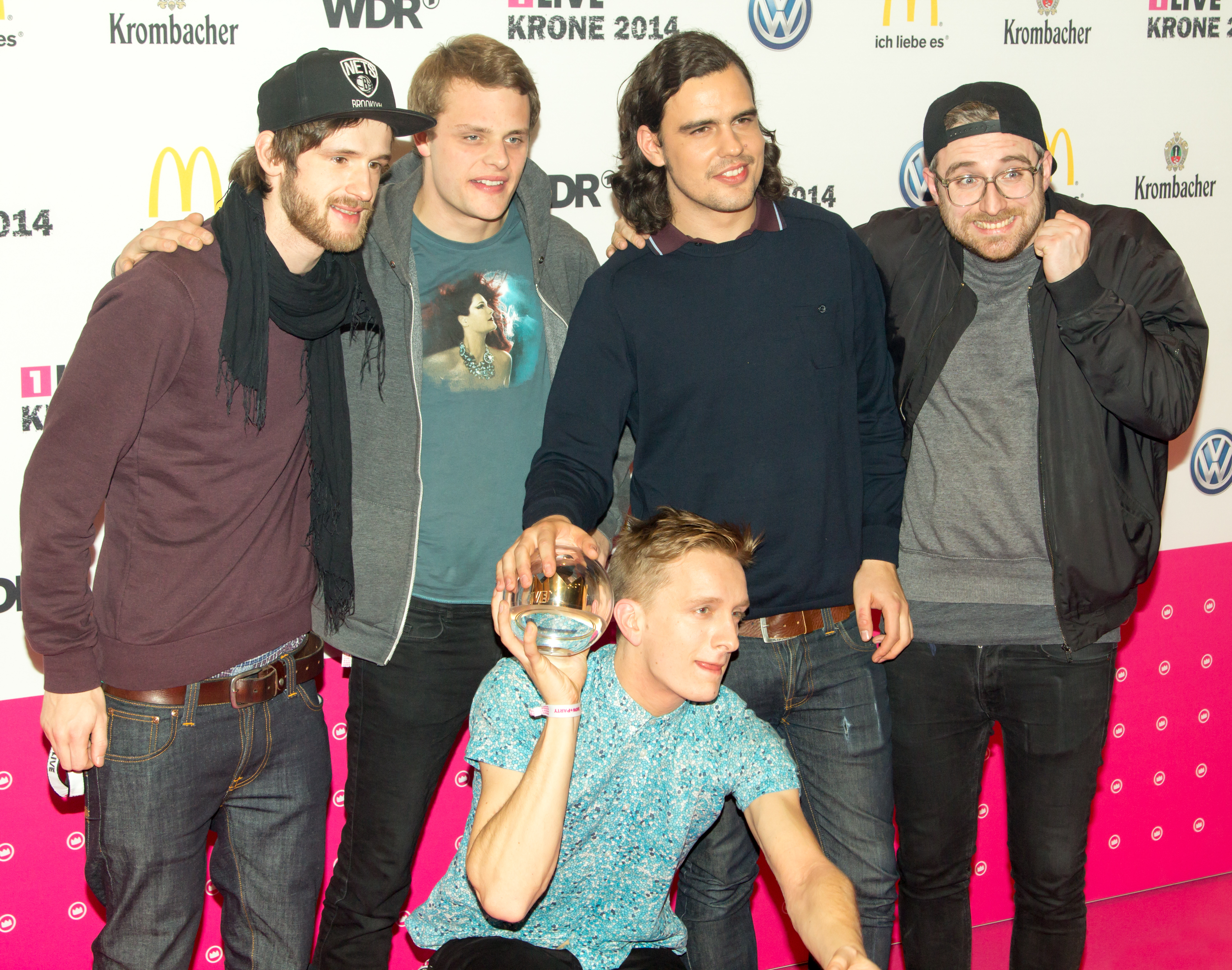 1LIVE Krone 2014 in der Bochumer Jahrhunderthalle: Beste Band: Kraftklub